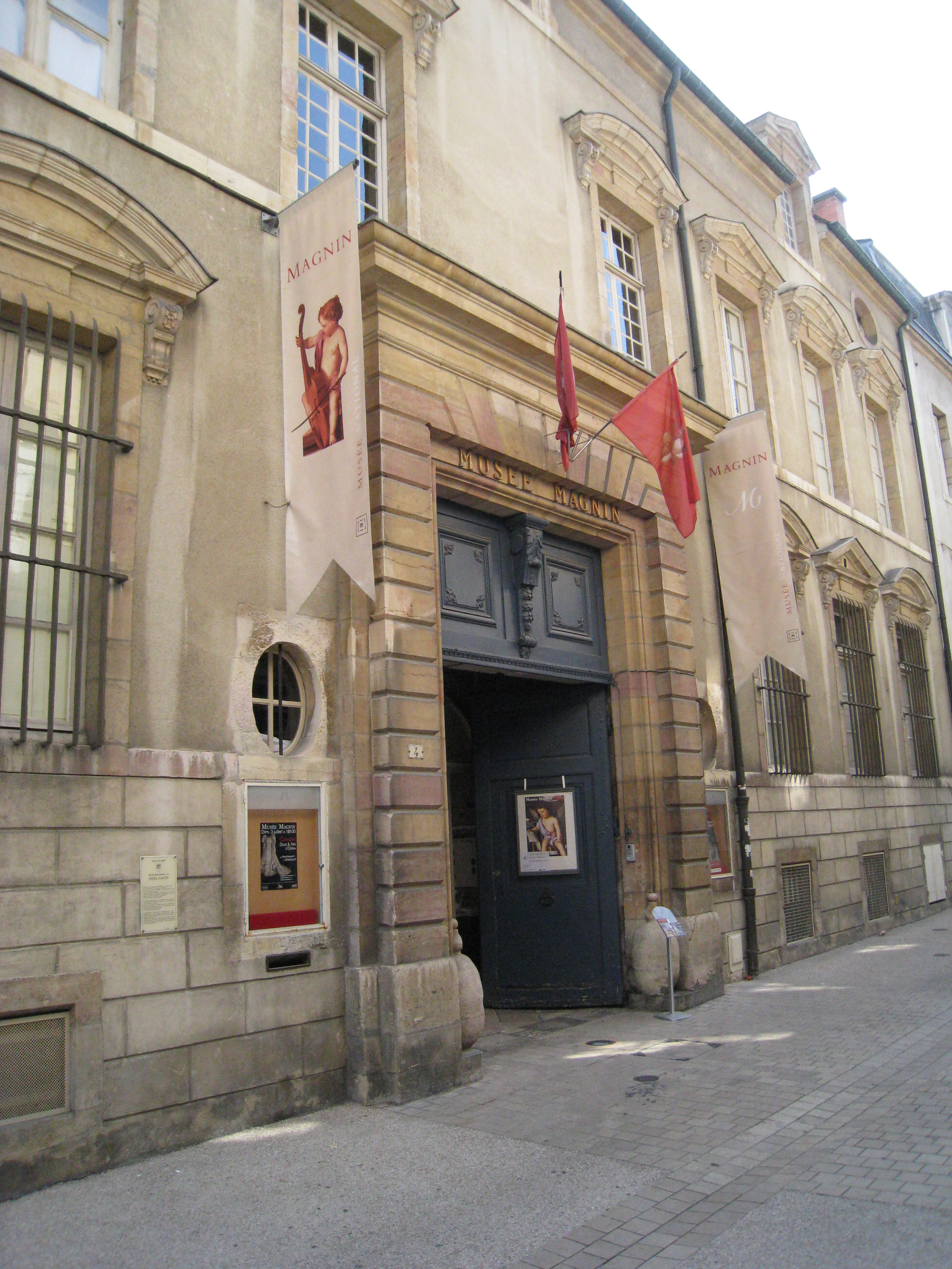 Musée Magnin, Dijon, Bourgogne